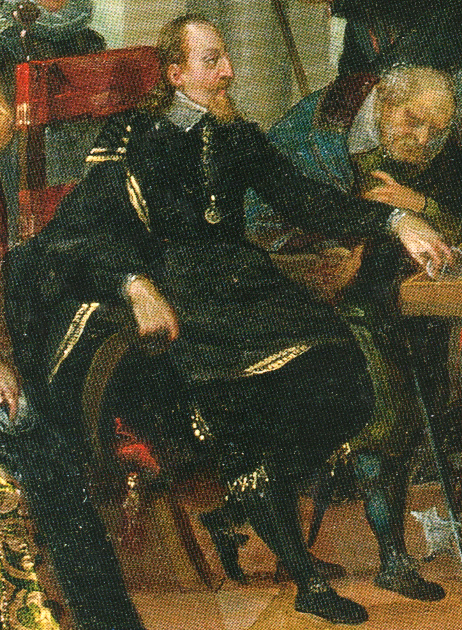 Herzog Philipp II. von Pommern-Stettin, Ausschnitt aus dem Gemälde von Anton Mozart: "Die Übergabe des Pommerschen Kunstschranks an Philipp II. von Pommern".